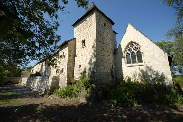 Chouzé sur Loire Plessis aux Moines